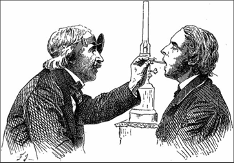 Aus der historischen Arbeit von Garcia über die Beobachtung der Stimmfunktion eines Sängers mit Hilfe des Kehlkopfspiegels